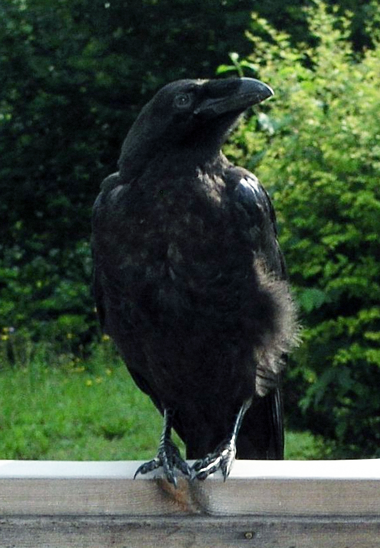 Obični gavran, Corvus Corax, Raven